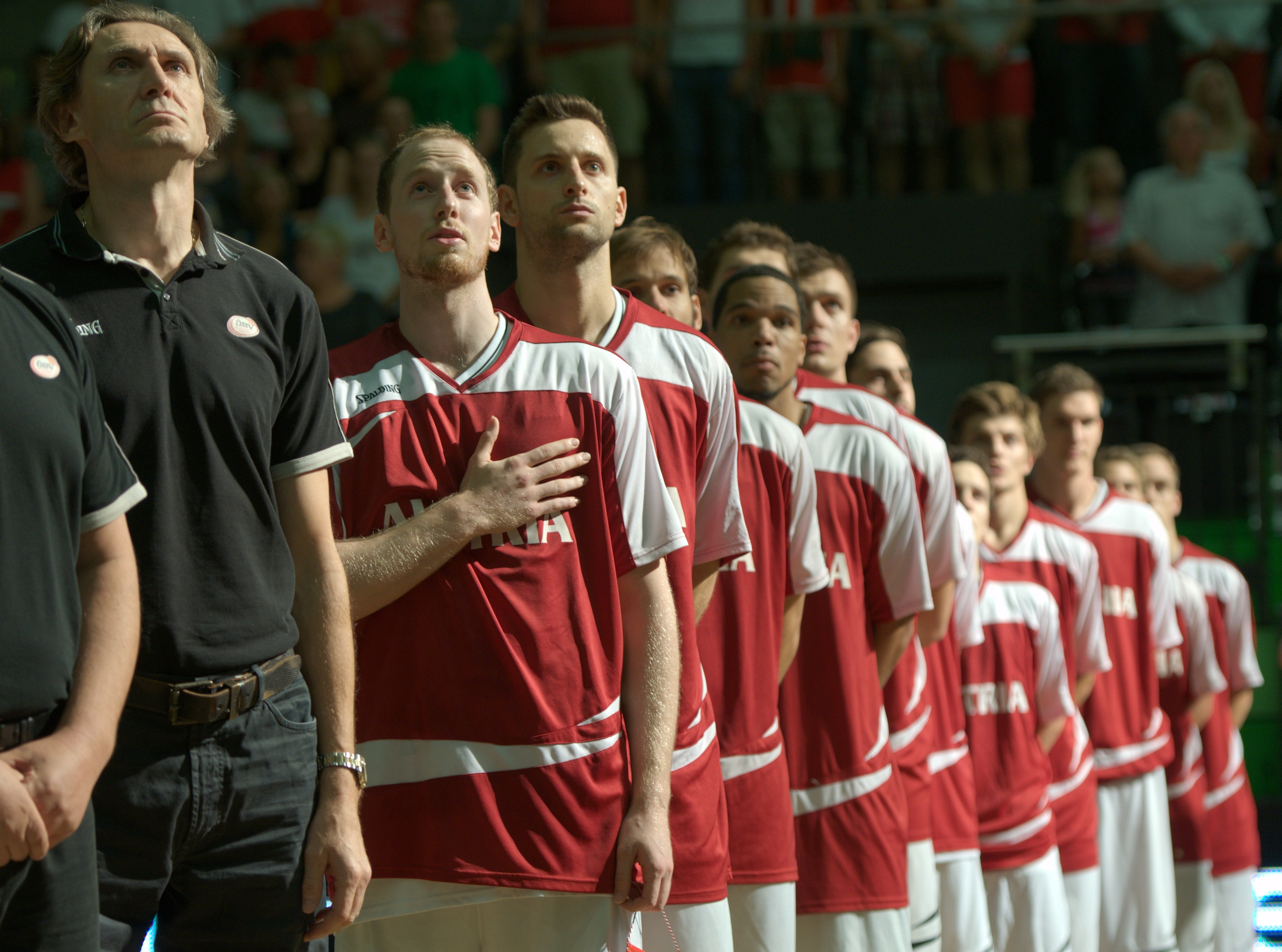 Die Spieler der österreichischen Basketball-Nationalmannschaft beim EuroBasket-Qualifikationsspiel gegen Kroatien während der österreichischen Nationalhymne